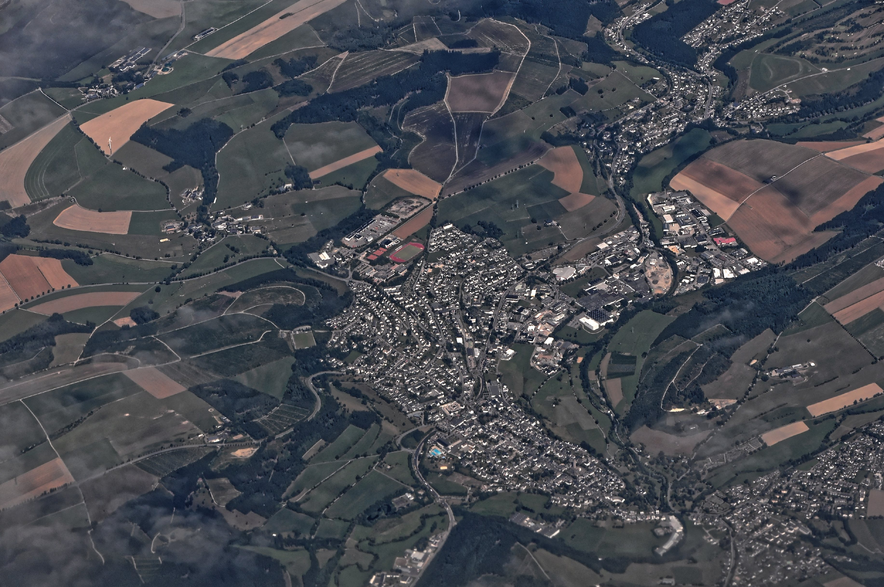 Bilder vom Flug -Rom-Düsseldorf-Hamburg 2013 Dieses Foto entstand in Zusammenarbeit mit Stadtbesichtigungen.de Die Seiten Stadtbesichtigungen.de, der dazugehörige Reise Blog sowie die Facebookseite: Stadtbesichtigungen Rom dürfen dieses Bild für Ihre Veröffentlichungen ohne den Hinweis auf Wikipedia, Commons bzw der Lizenz verwenden. Die Verantwortlichen habe von mir (Ra Boe) die Originaldaten zur freien Verfügung übermittelt bekommen.